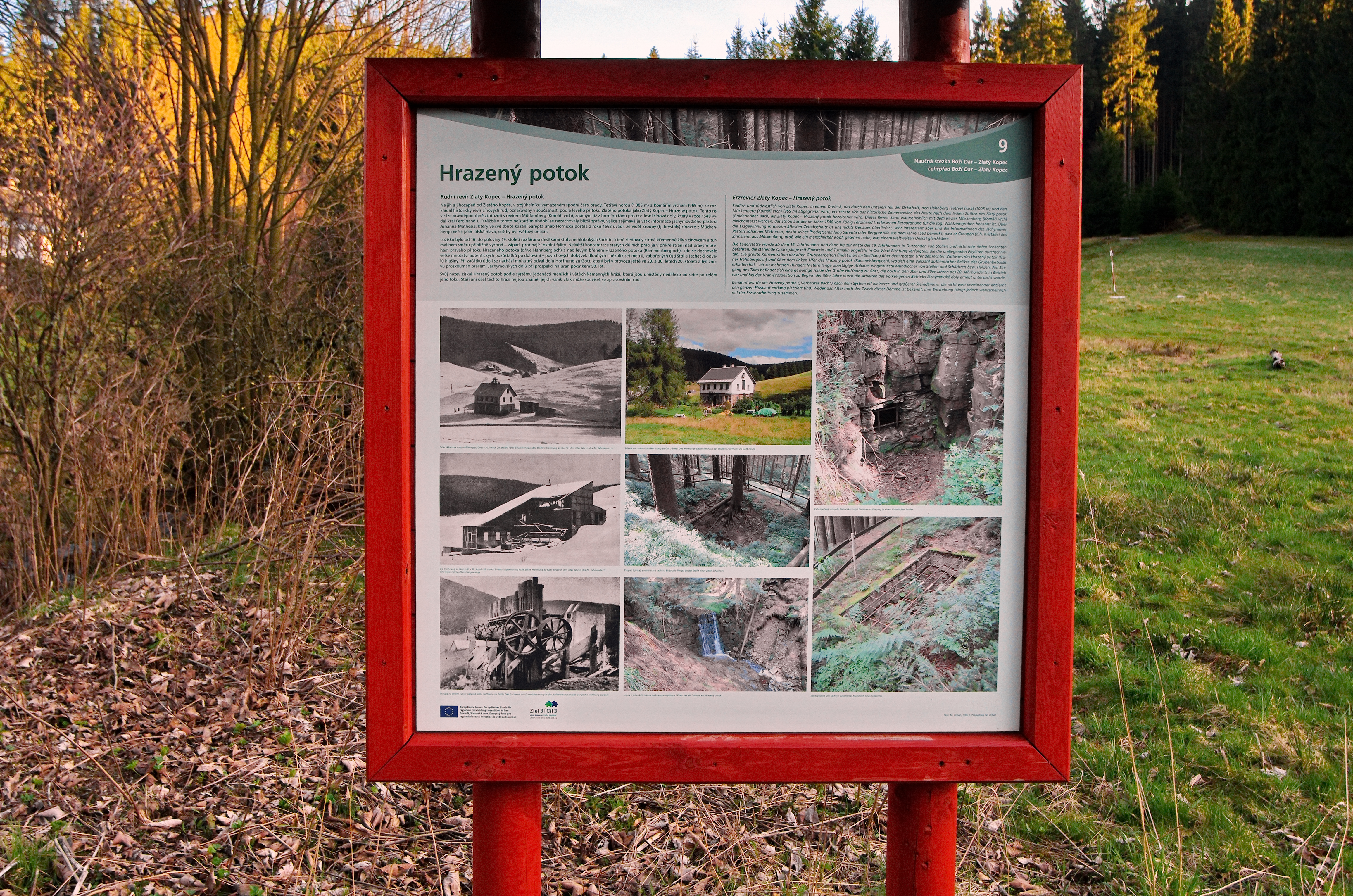 Rudný revír Hrazený potok - Zlatý kopec, Zlatý Kopec.